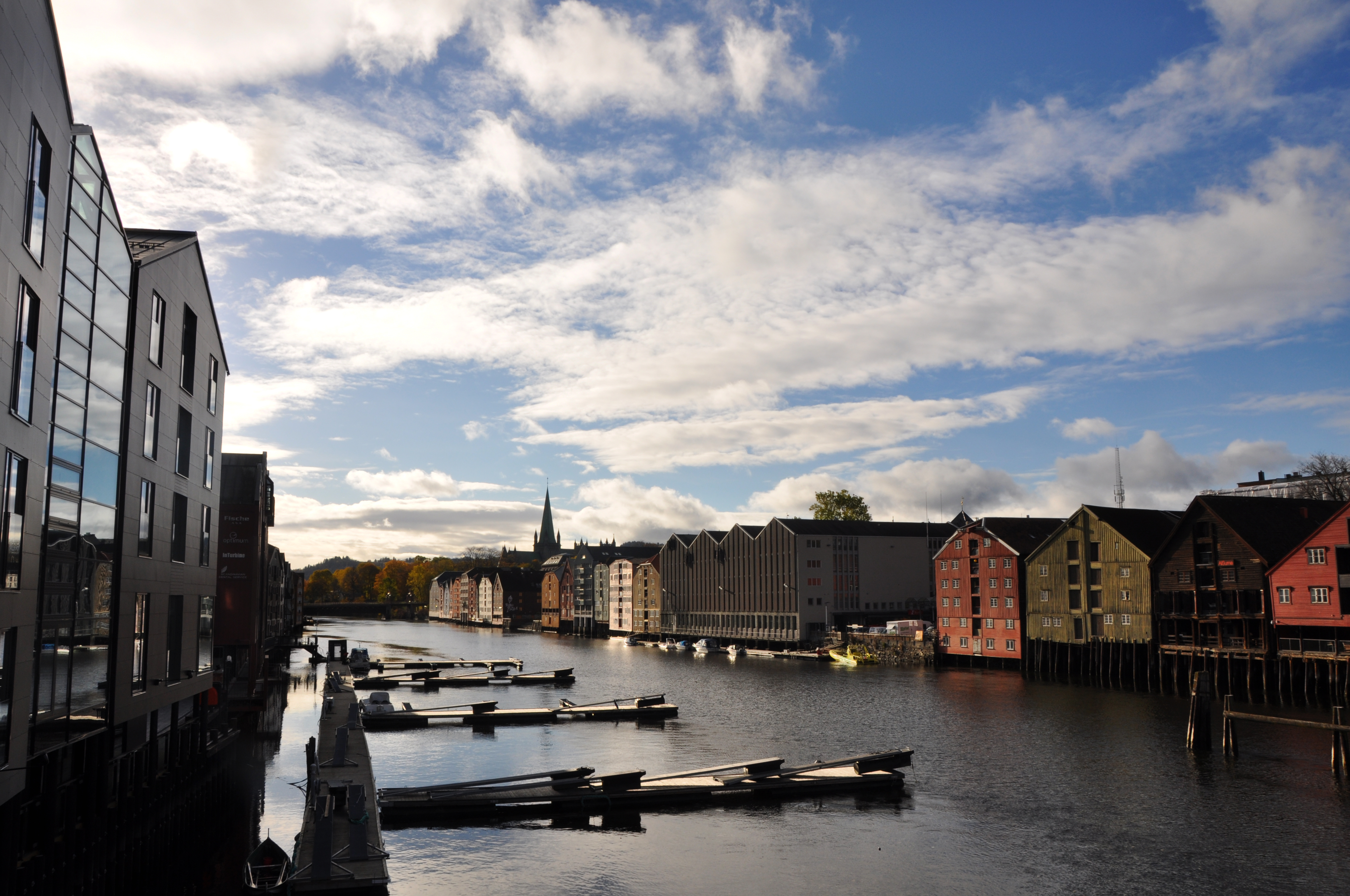 Nidelva er en 30 kilometer lang elv i Sør-Trøndelag. Nidelva har sitt utspring i Selbusjøen og renner ut i Trondheimsfjorden i sentrum av Trondheim.